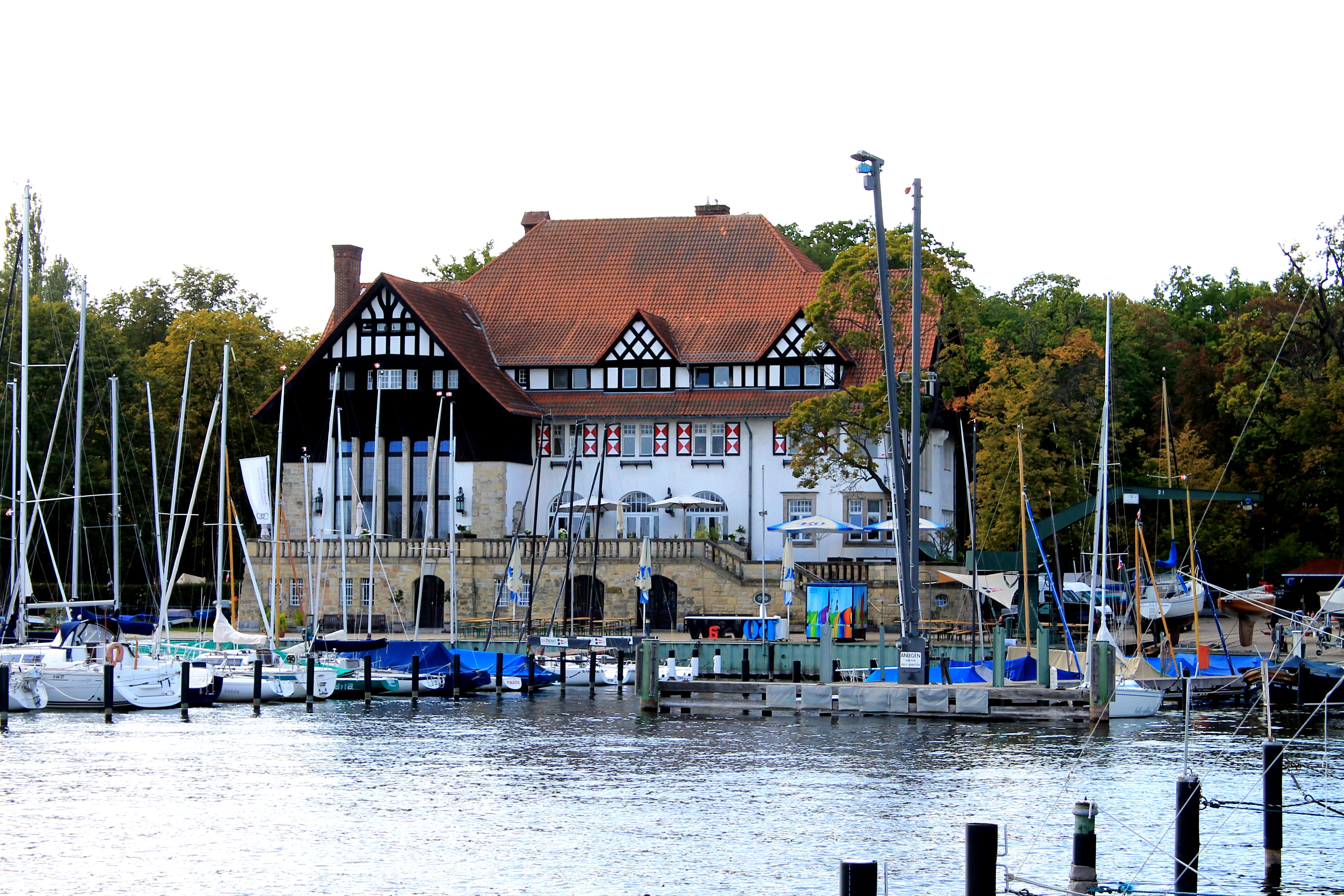 Verein Seglerhaus am Wannsee (Berlin), Vereinsheim